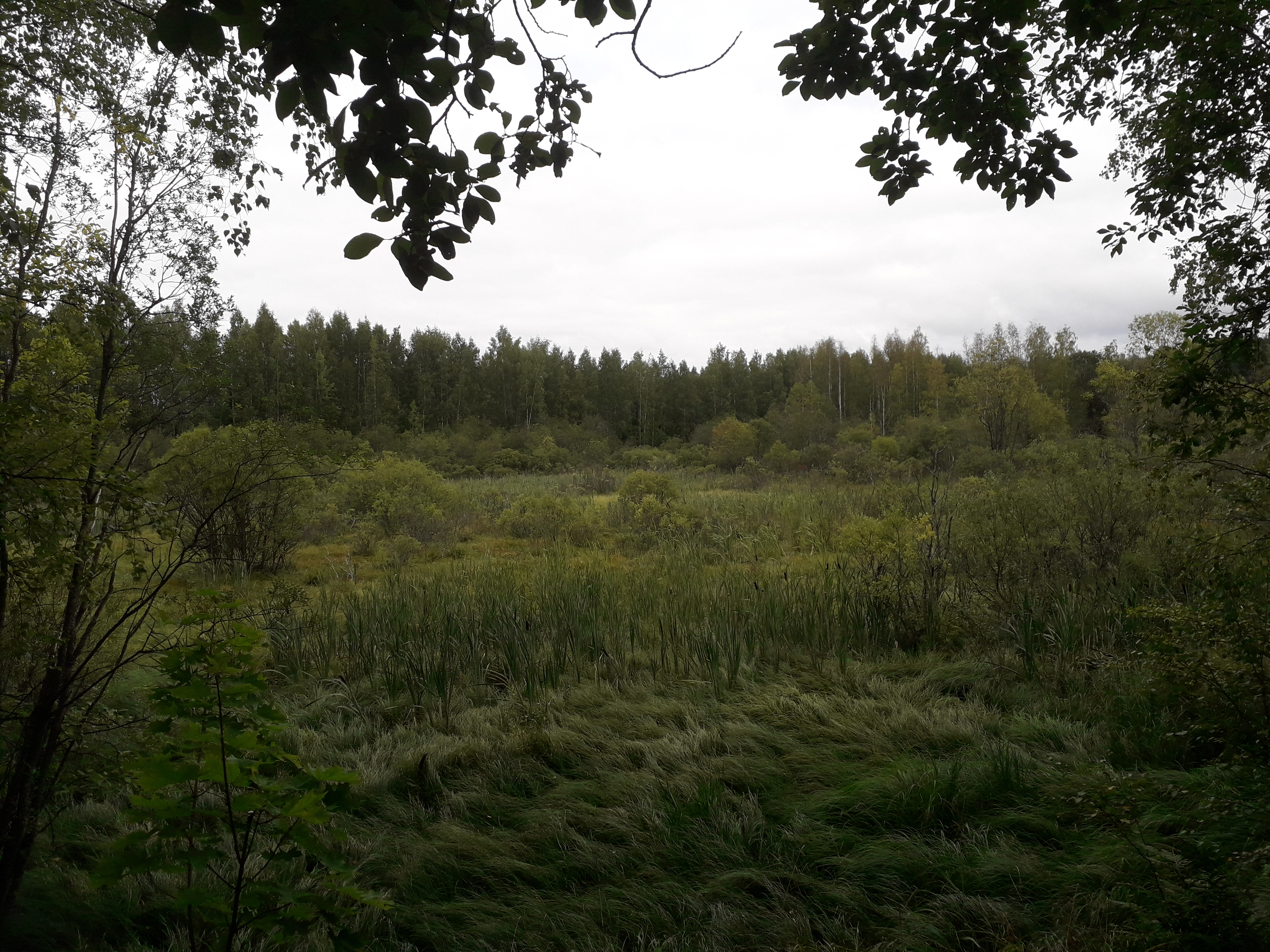 Luontoa Peltosaaren kosteikkopuistossa, Riihimäellä.